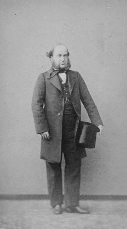 Князь Лев Андреевич Гагарин (1821—1886)